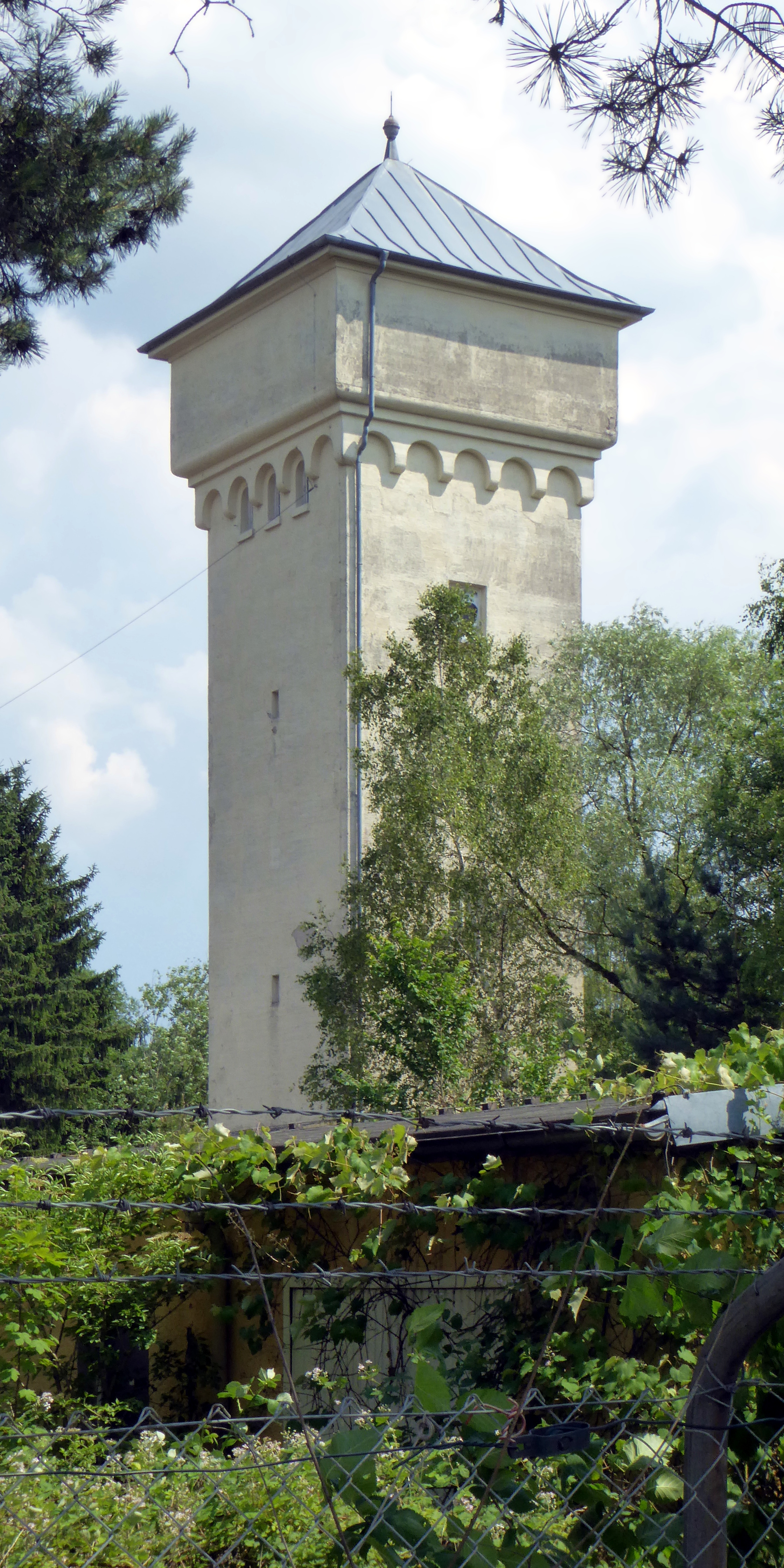 Garching-Hochbrück, ehemaliger Wasserturm der Munitionsanstalt.